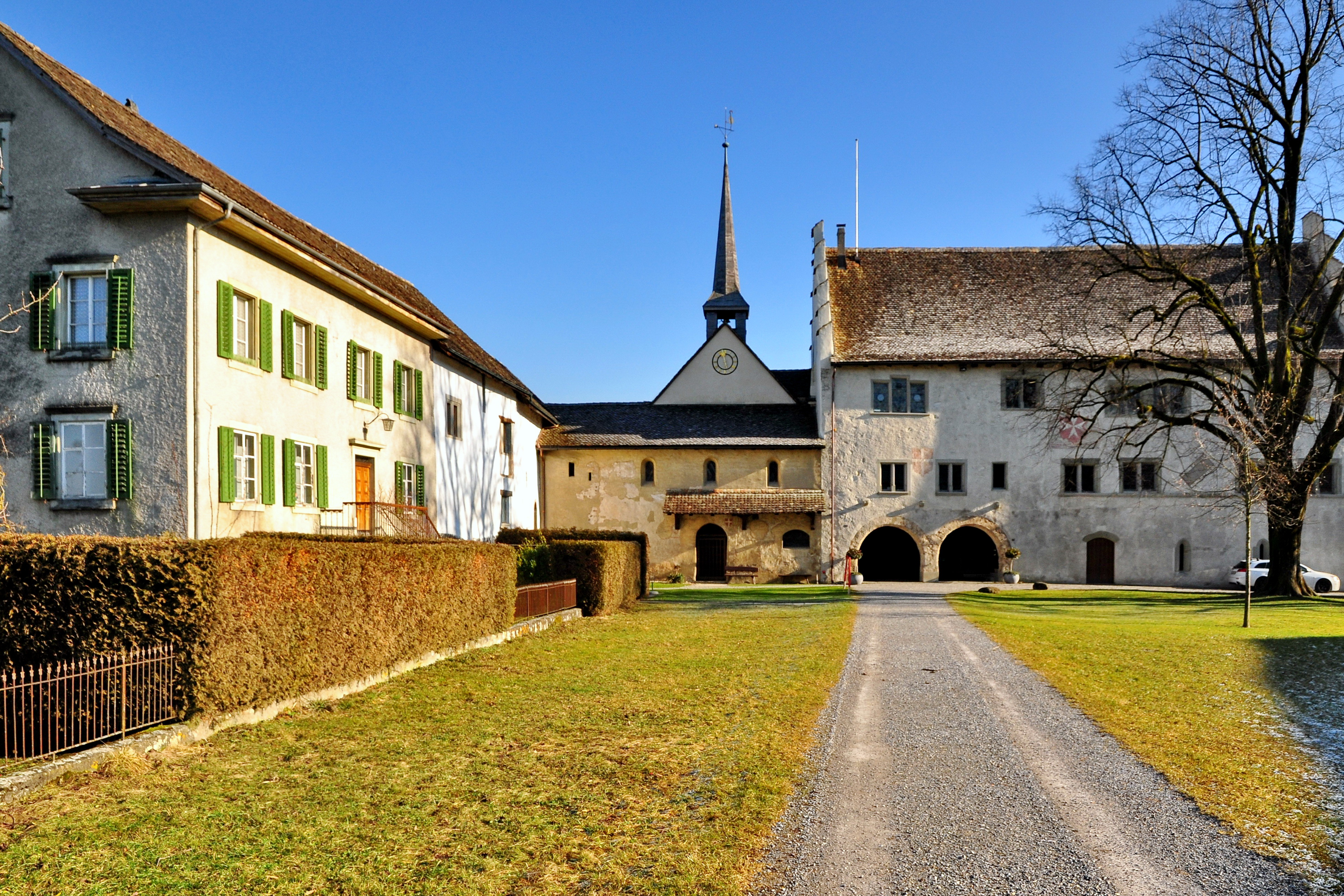 Ritterhaus in Bubikon (Switzerland)